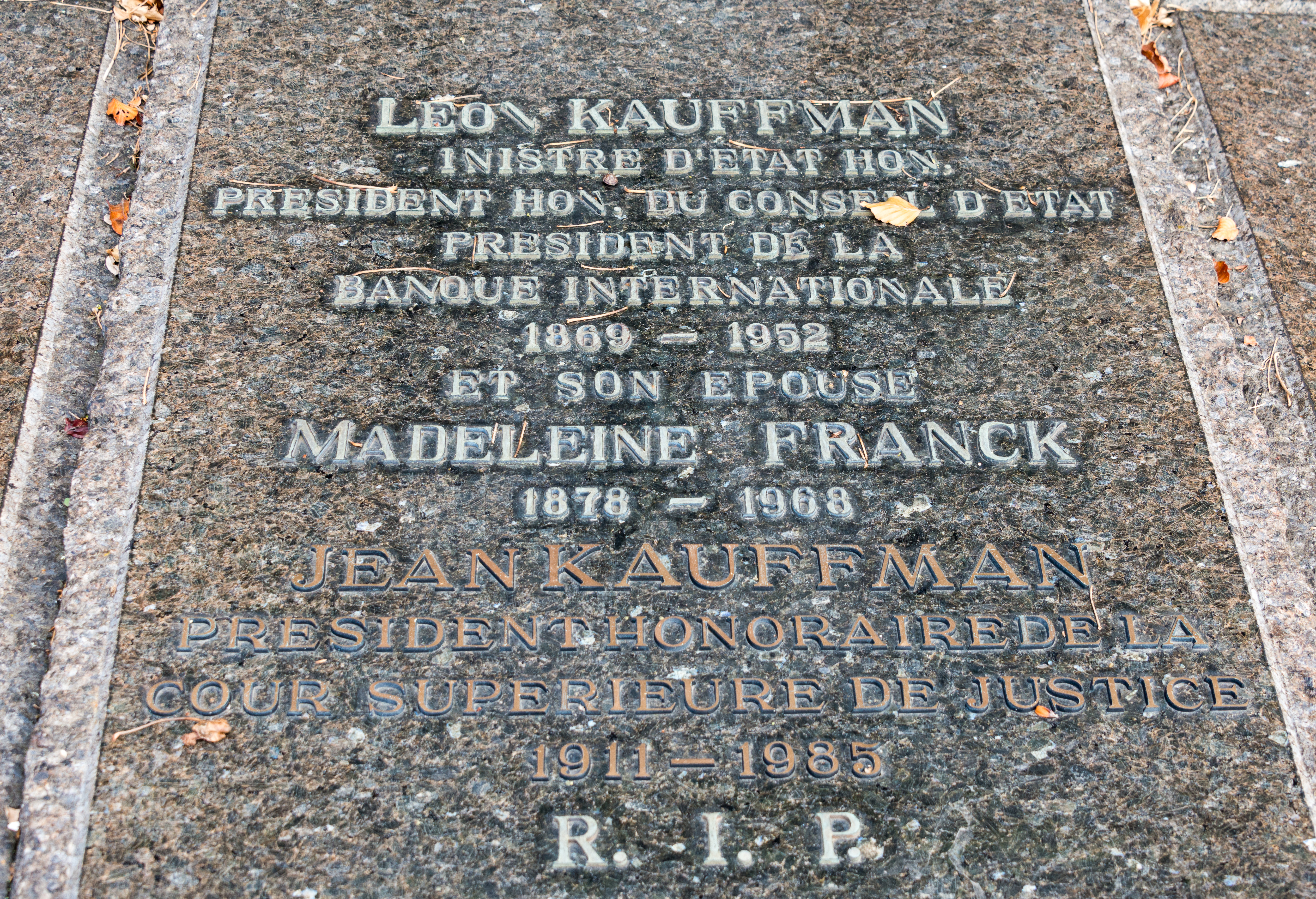 D'Familljegraf Léon Kauffman um Nikloskierfecht.